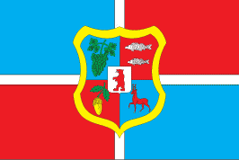 Прапор Іршавського району